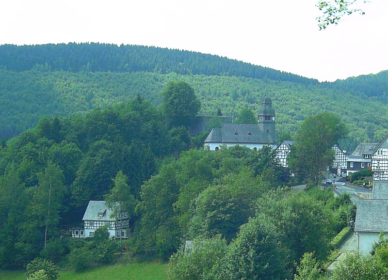 Nordenau (Schmallenberg), Germany.